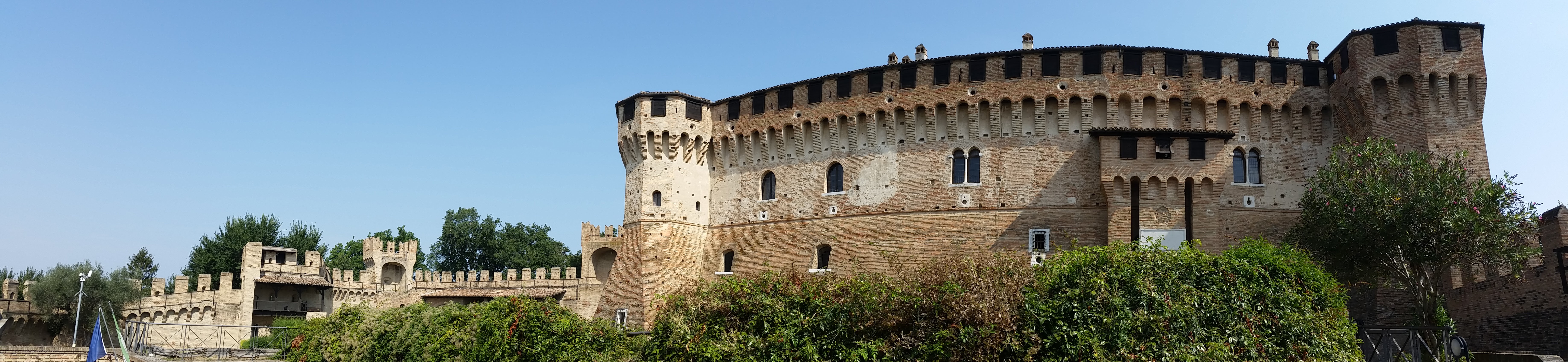 Rocca Demaniale This is a photo of a monument which is part of cultural heritage of Italy.